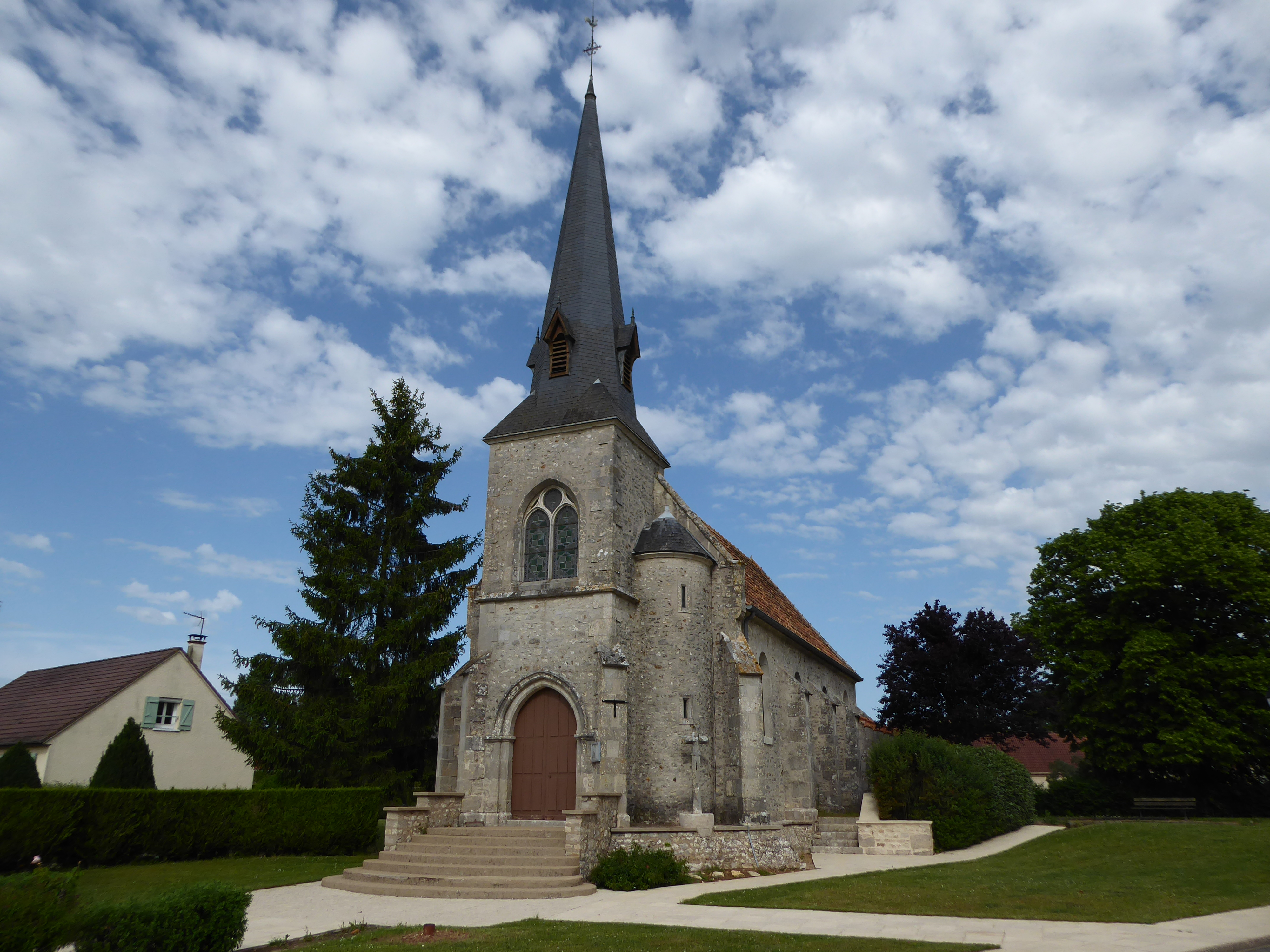 église Saint-Laurent, Villeneuve-Saint-Nicolas, Eure-et-Loir, France.